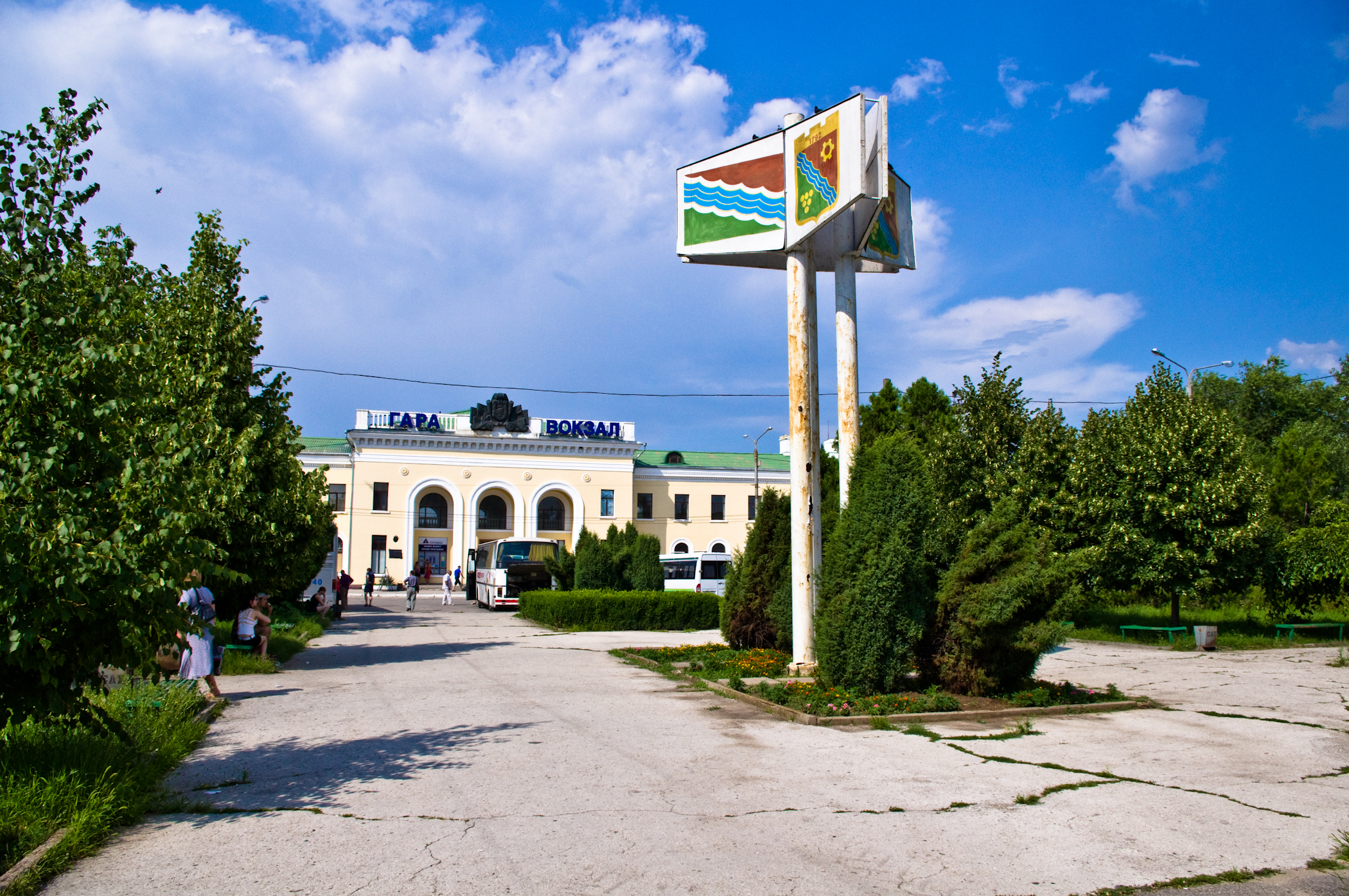 Авто и ж.д. вокзал в городе Тирасполь. 2011 год.